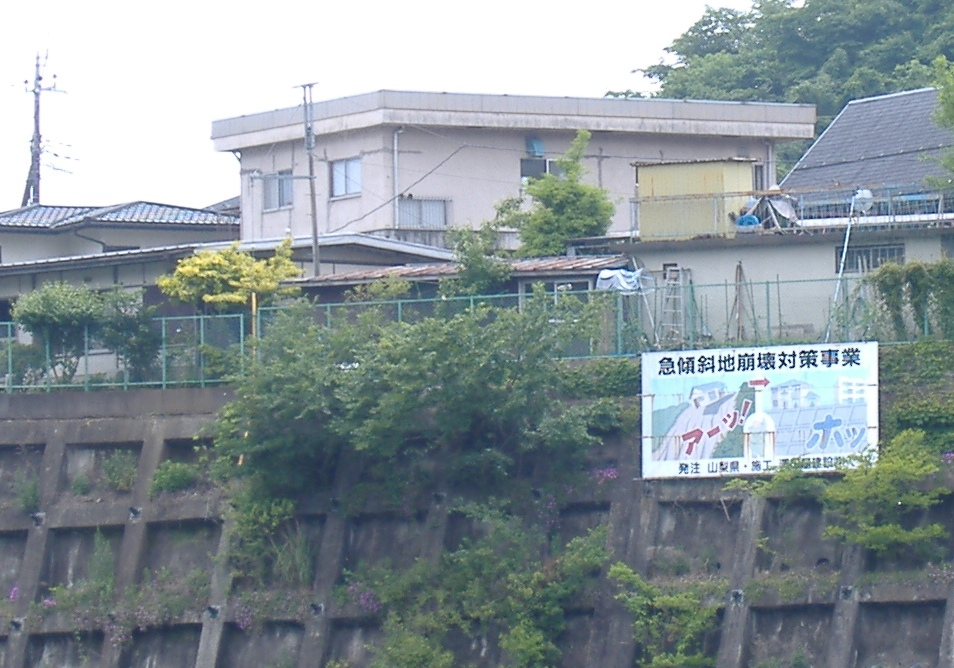 大月バイパス延伸予定地